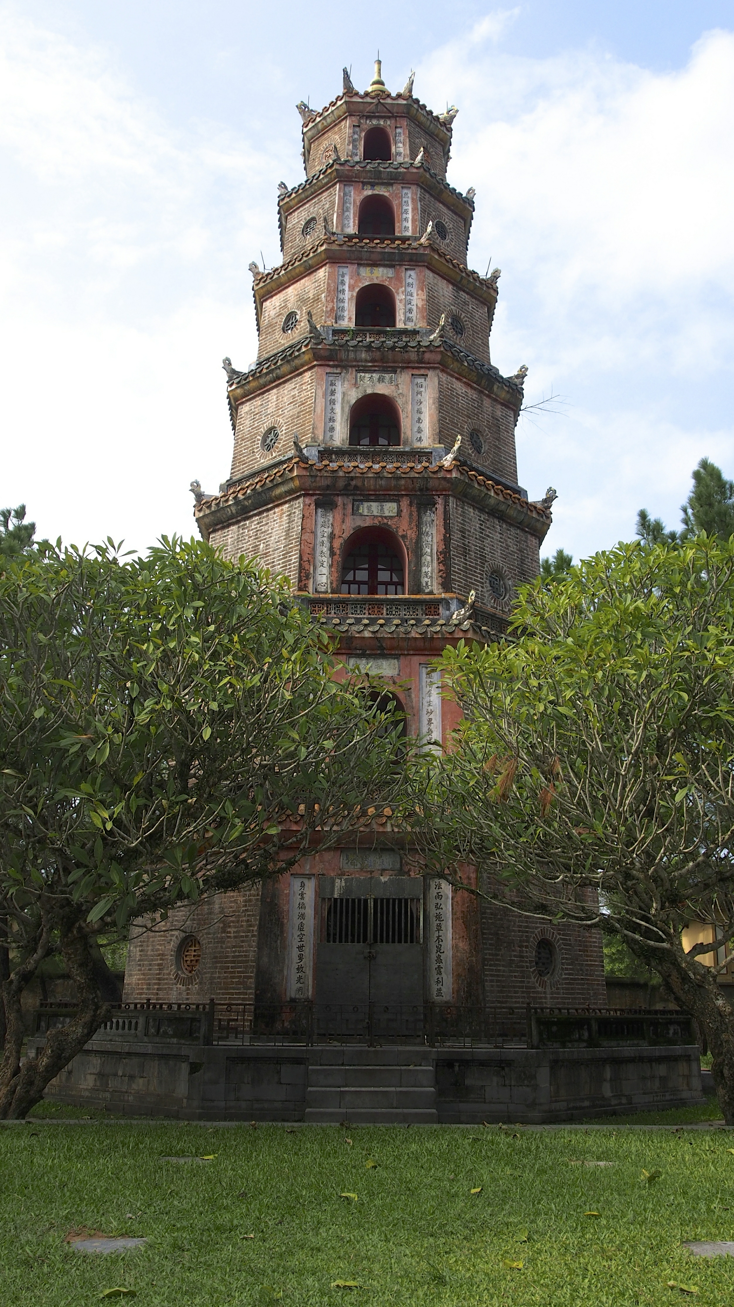 Thiên Mụ Pagoda Hue, Vietnam